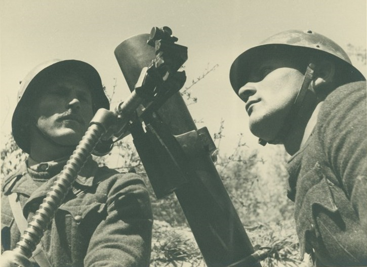 Артилеристи минохвъргачи от Дванадесета пехотна дивизия на фронта.